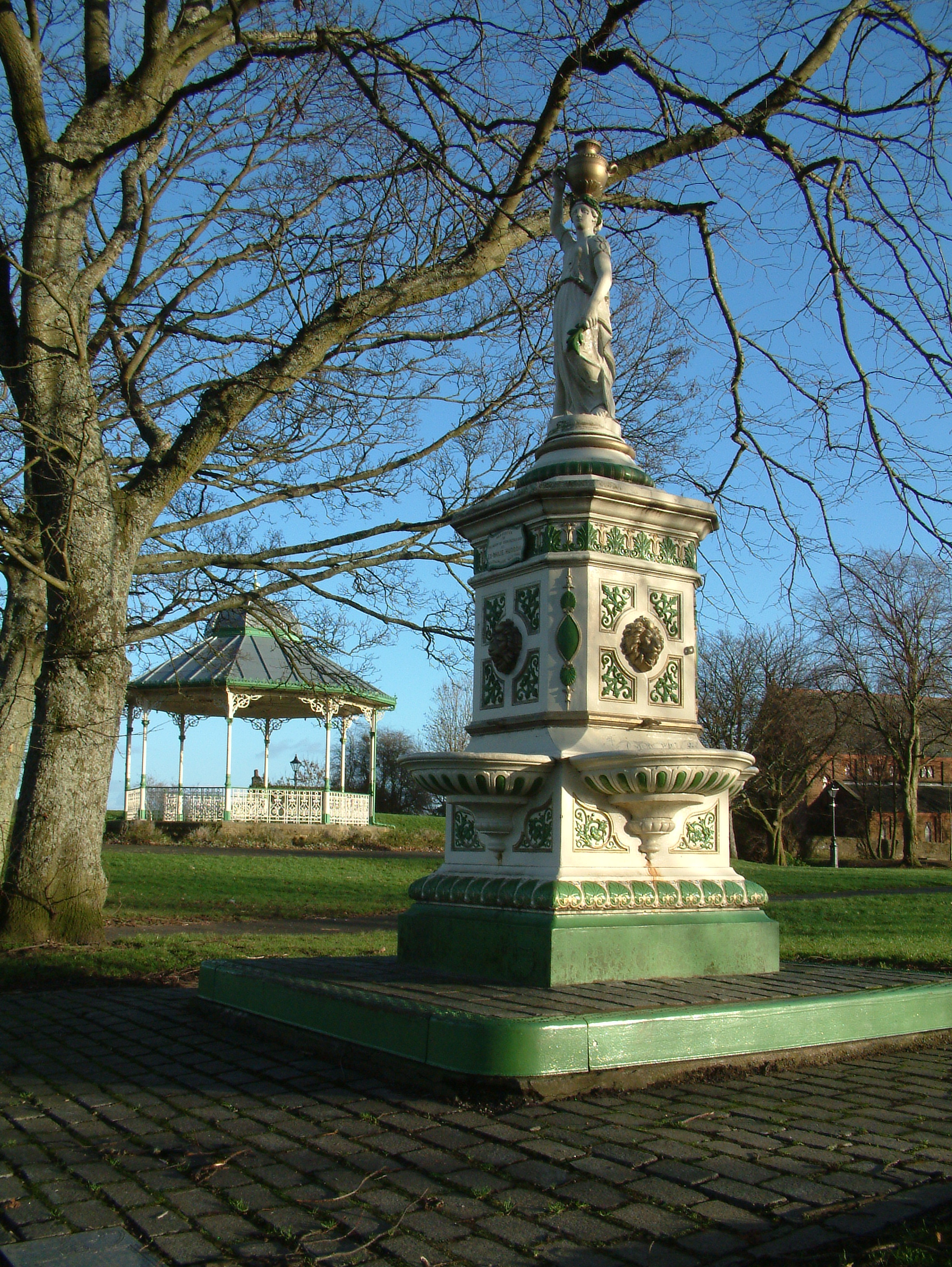 own work, StaraBlazkova 2007